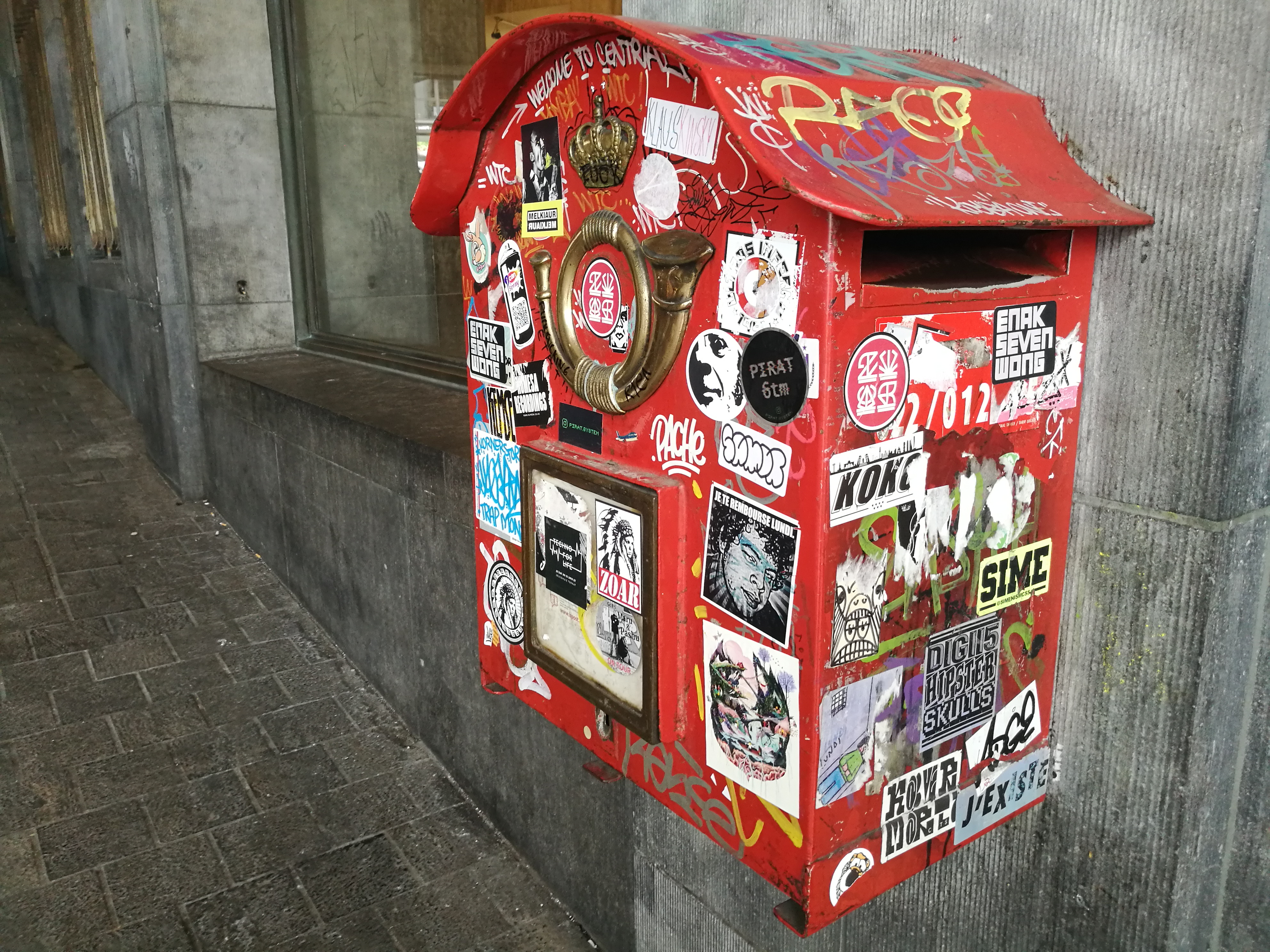 Boite aux lettres couverte de stickers à Bruxelles, Belgique (2019)